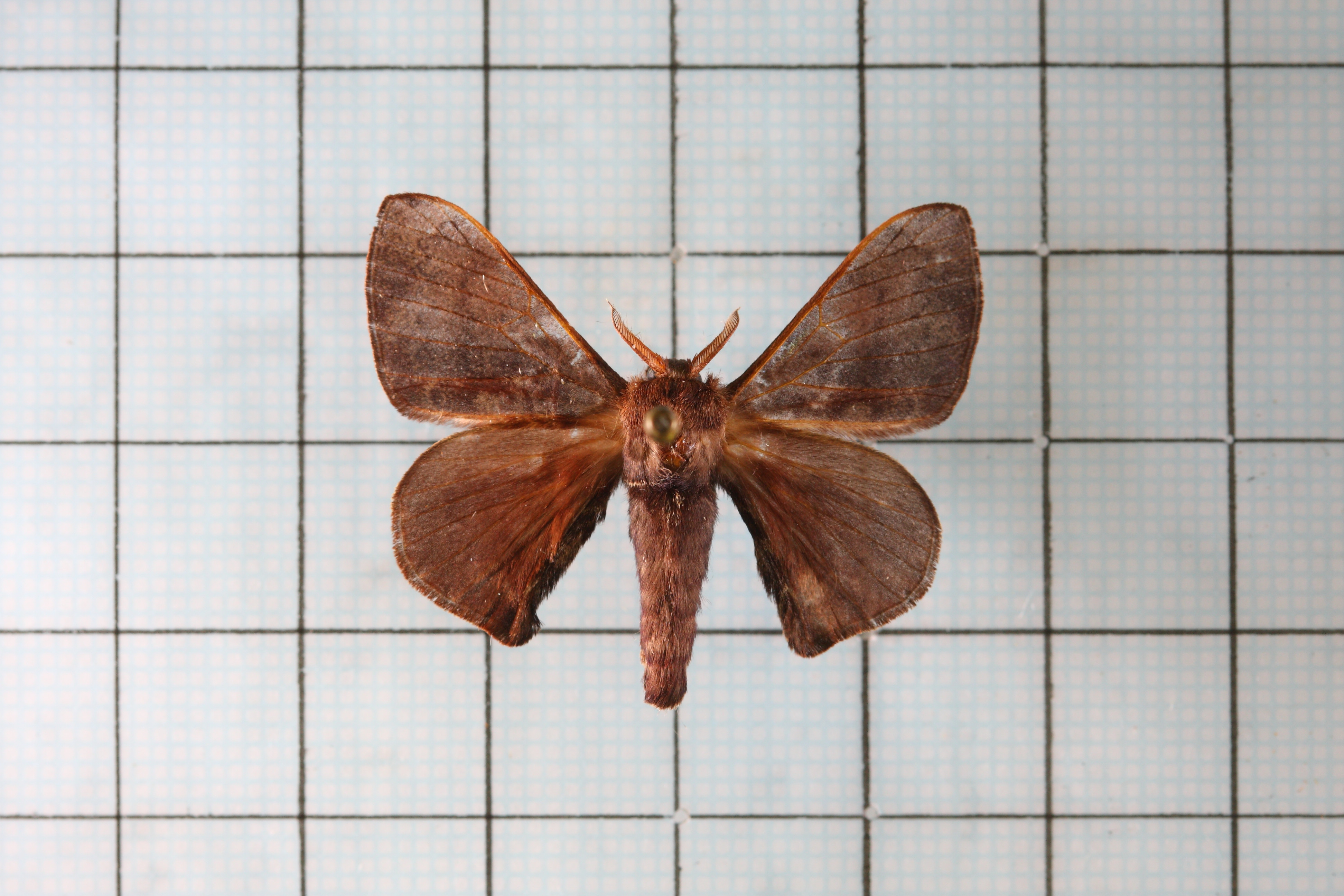 Triuncina brunnea (Wileman 1911) 褐斑白蠶蛾 鞍2:P.72,Pl.42-5